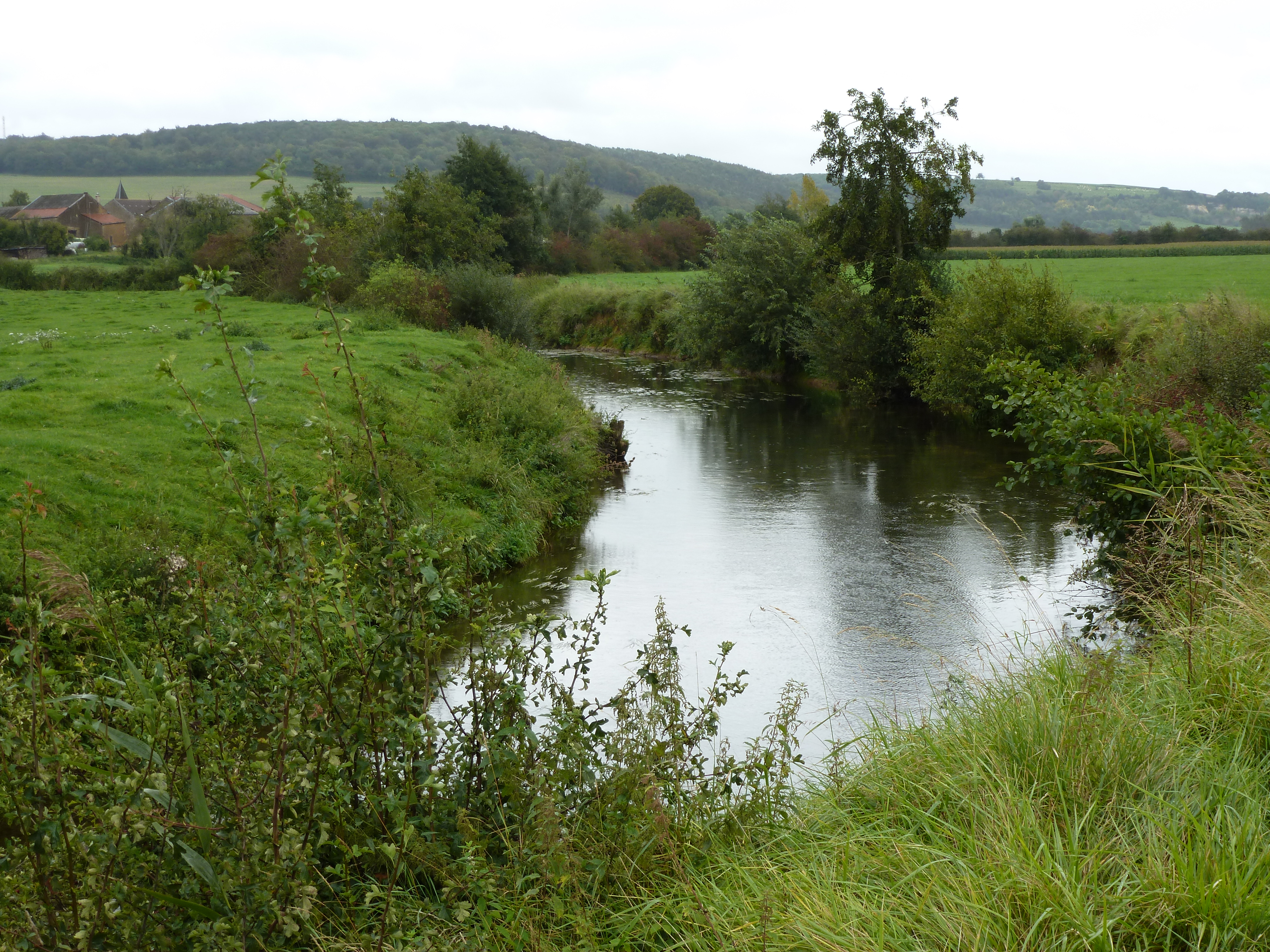 Vue de la rivière Bar dans le sens inverse de l'écoulement, en direction de Connage